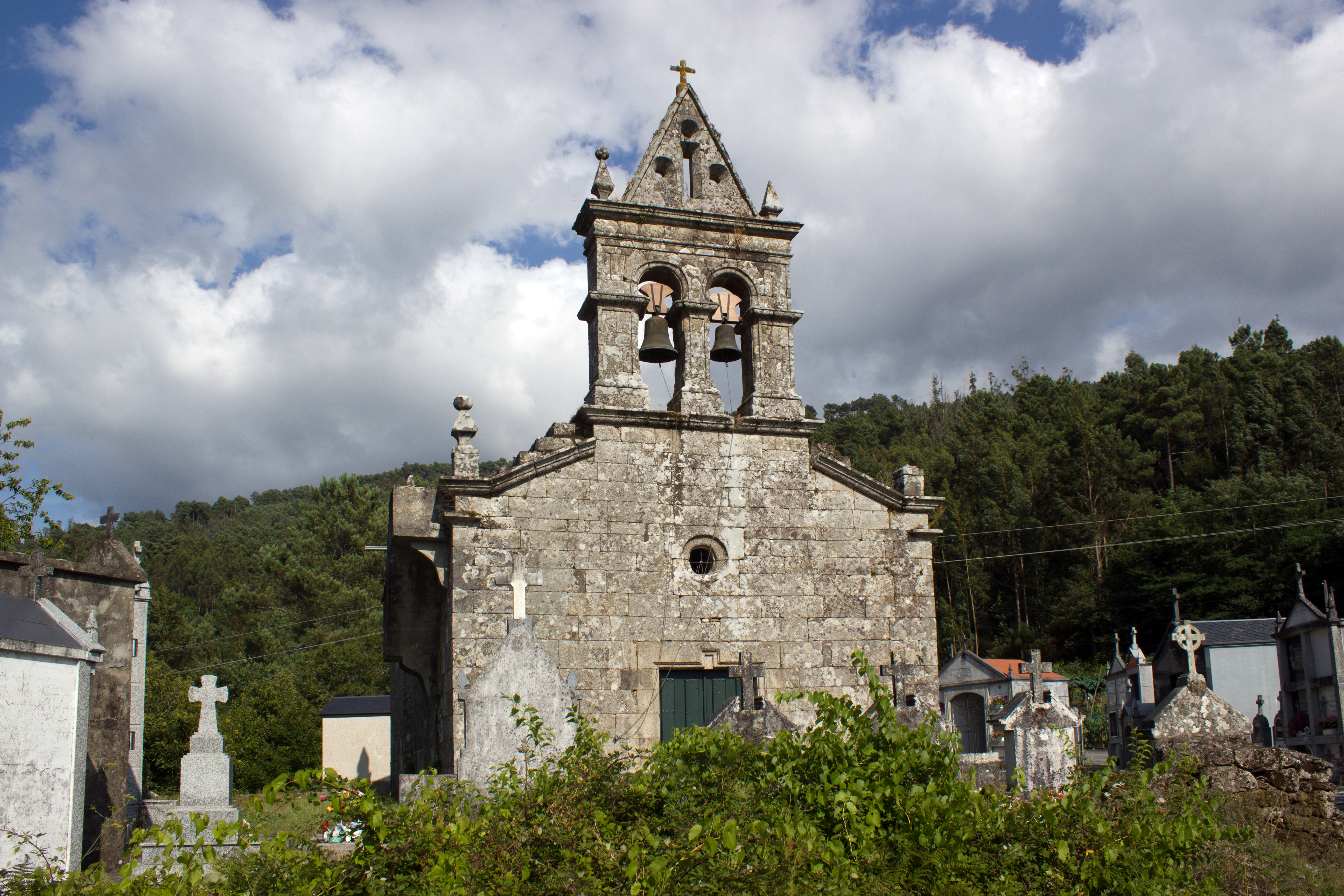 Igrexa de Santa María do Condado, no concello de Padrenda.